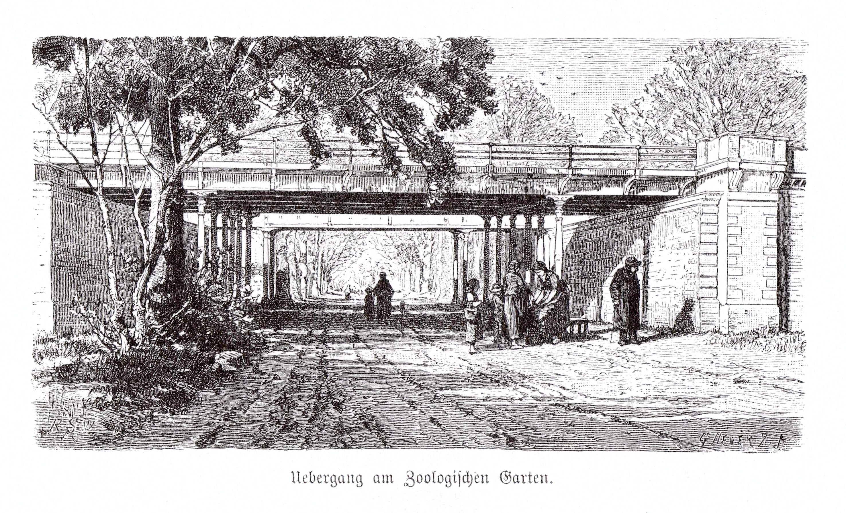 Der Holzschnitt von 1882 zeigt die neue Berliner Stadtbahn-Brücke über die Hardenbergstraße am Bahnhof Zoologischer Garten.